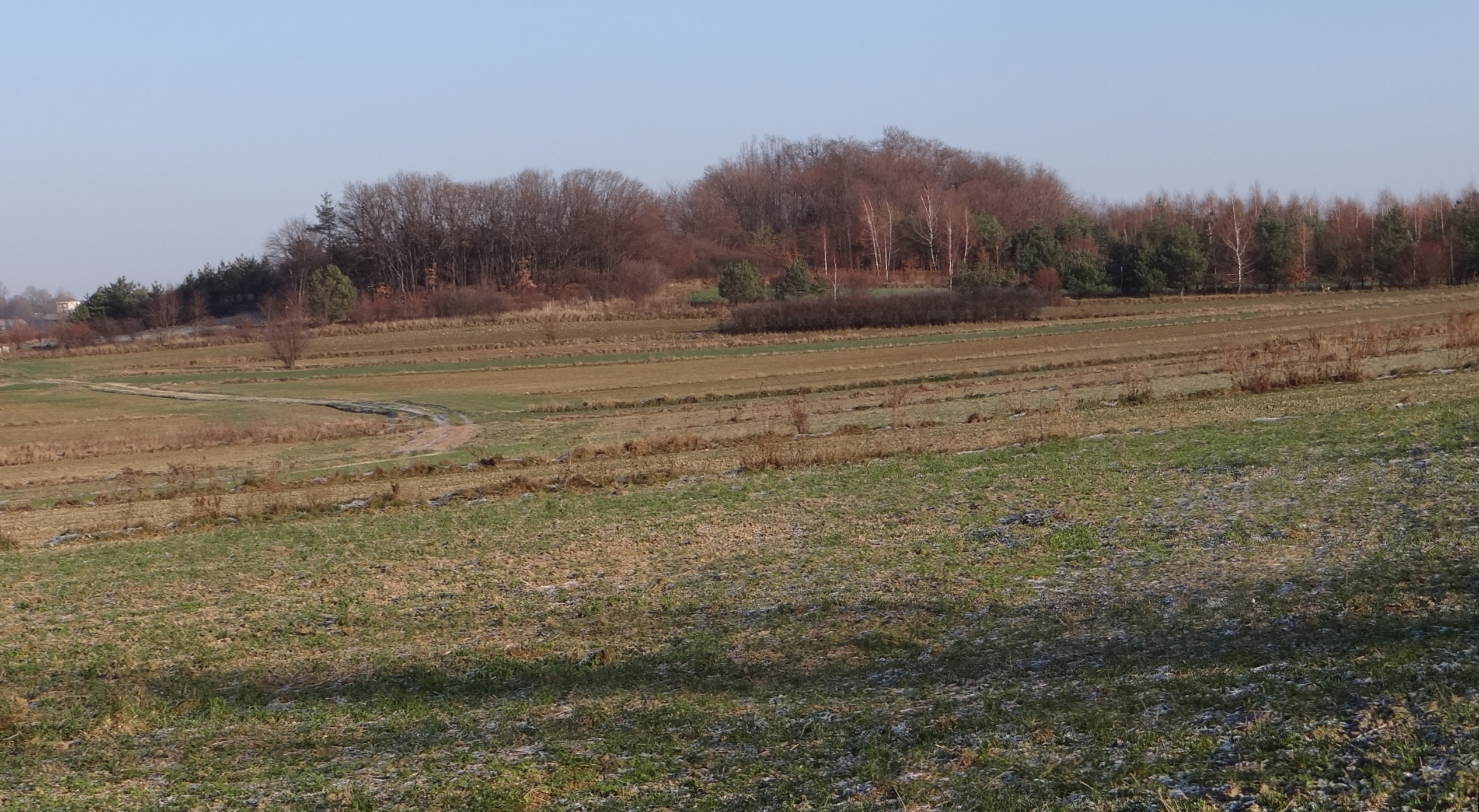 Wzniesienie Osiczonki w Będkowicach